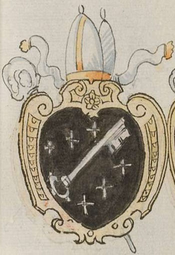 Wappen des Bistums Worms - Großes Wappenbuch, enthaltend die Wappen der deutschen Kaiser, der europäischen Königs- und Fürstenhäuser, der Päpste und Kardinäle, Bischöfe und Äbte bis zu den lebenden Repräsentanten zur Zeit der Regentschaft Kaiser Rudolfs II. und Papst Gregors XIII. - Cod.icon. 333